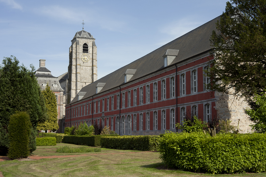 Fondée en 1130